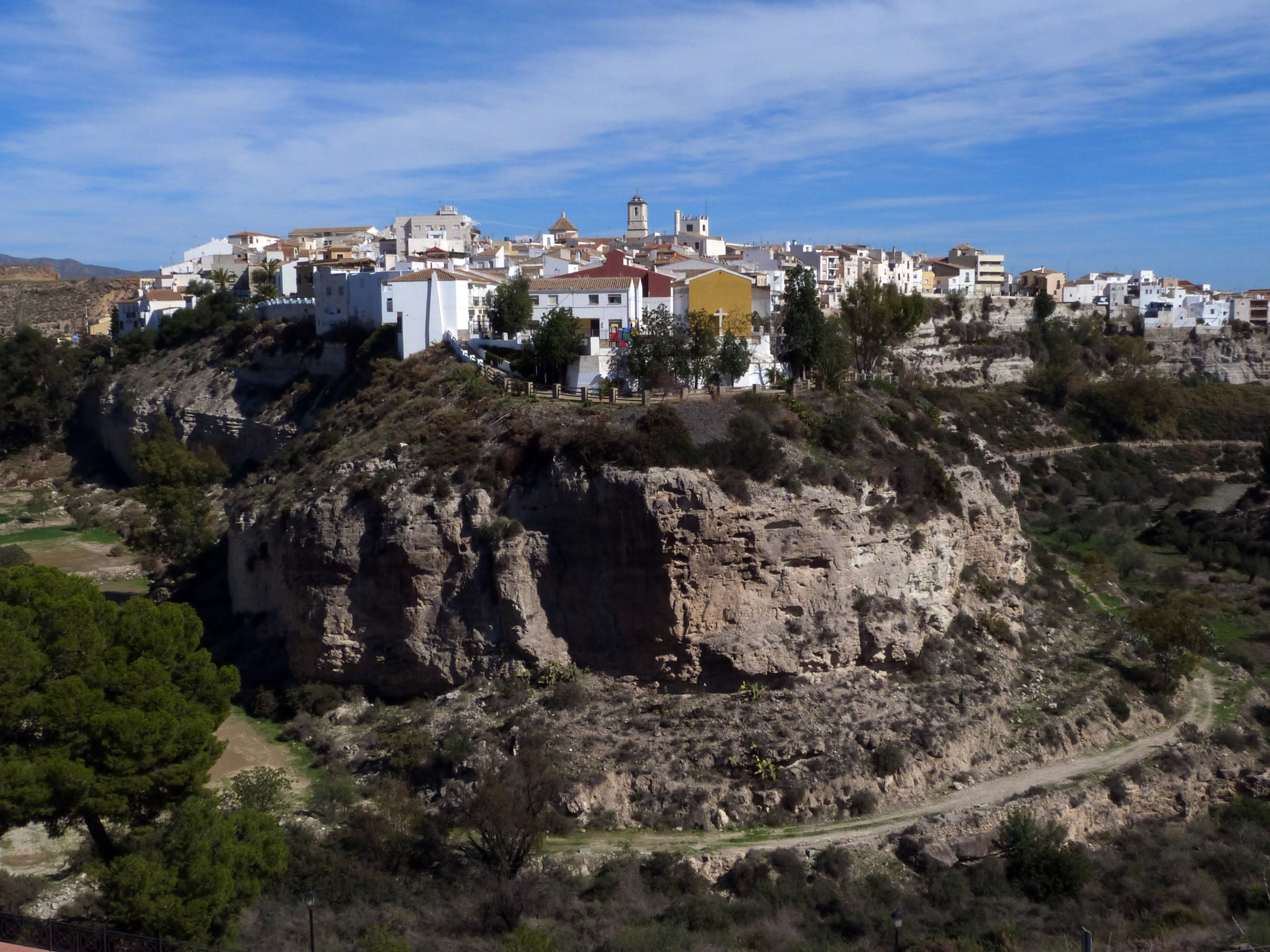 Sorbas, Provinz Almería